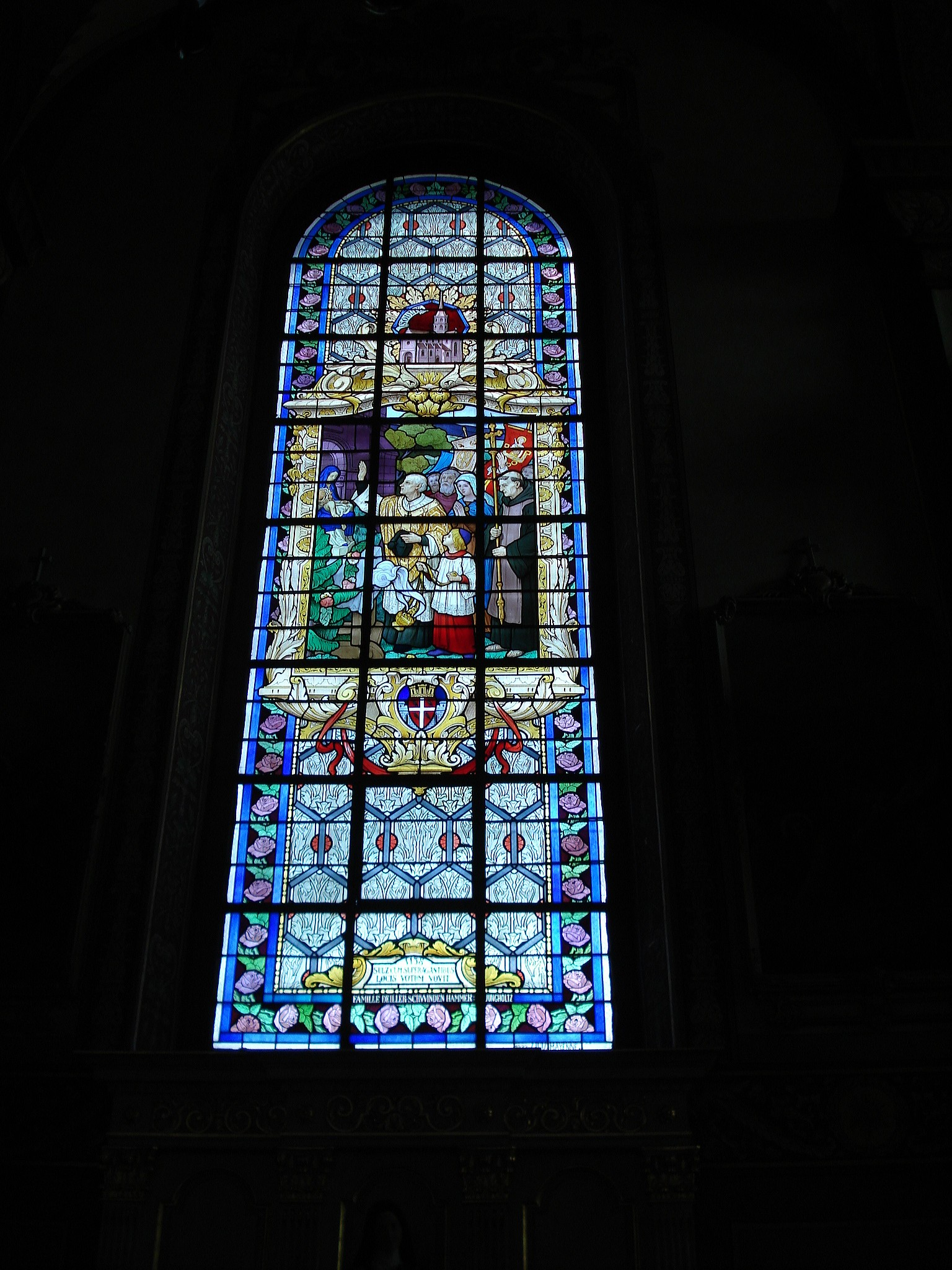 Thierenbach : Vitrail rappelant le voeu de la commune de Soultz en 1138